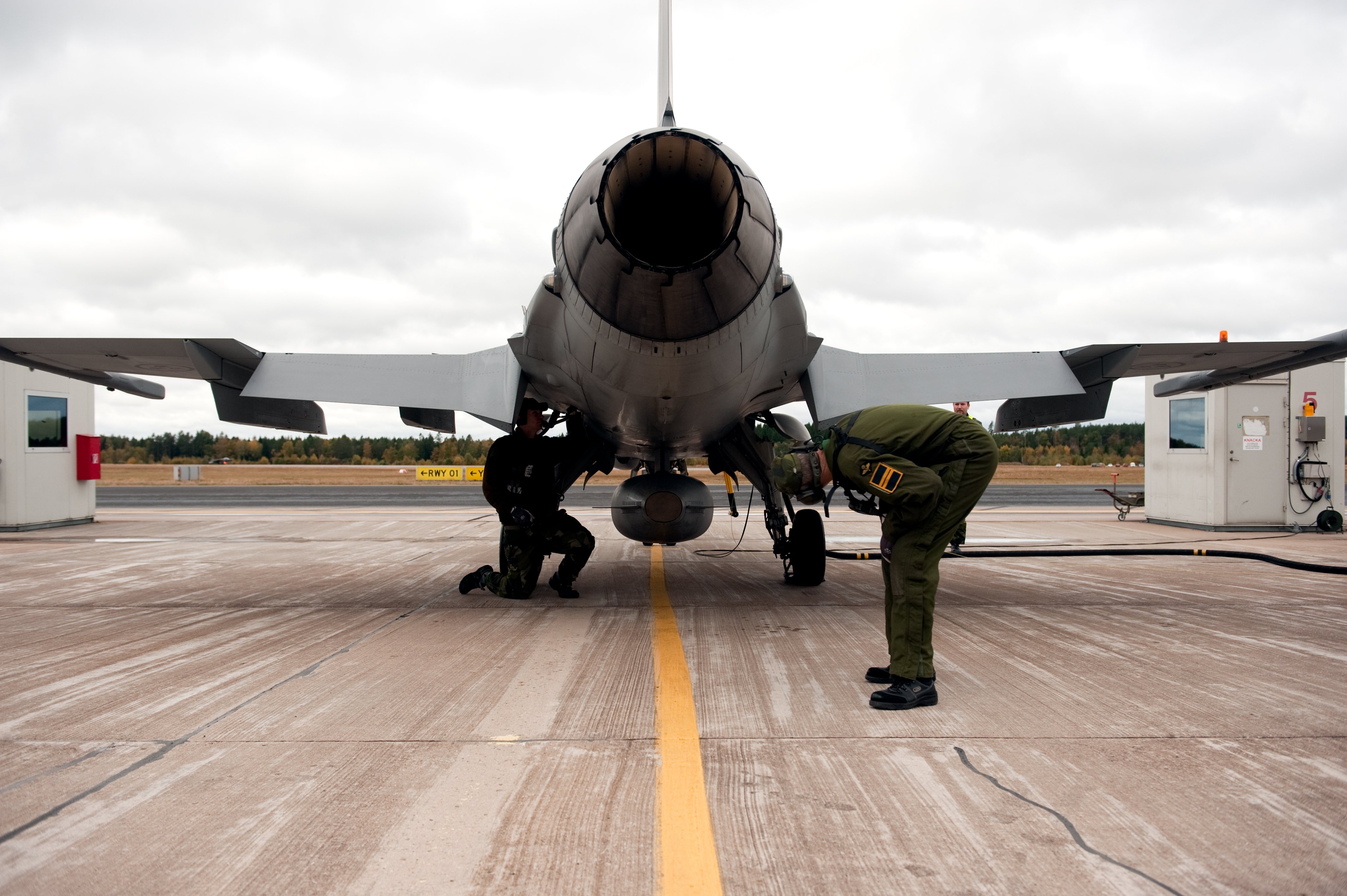 Klargöring av JAS 39 Gripen på F17, Kallinge Sverige